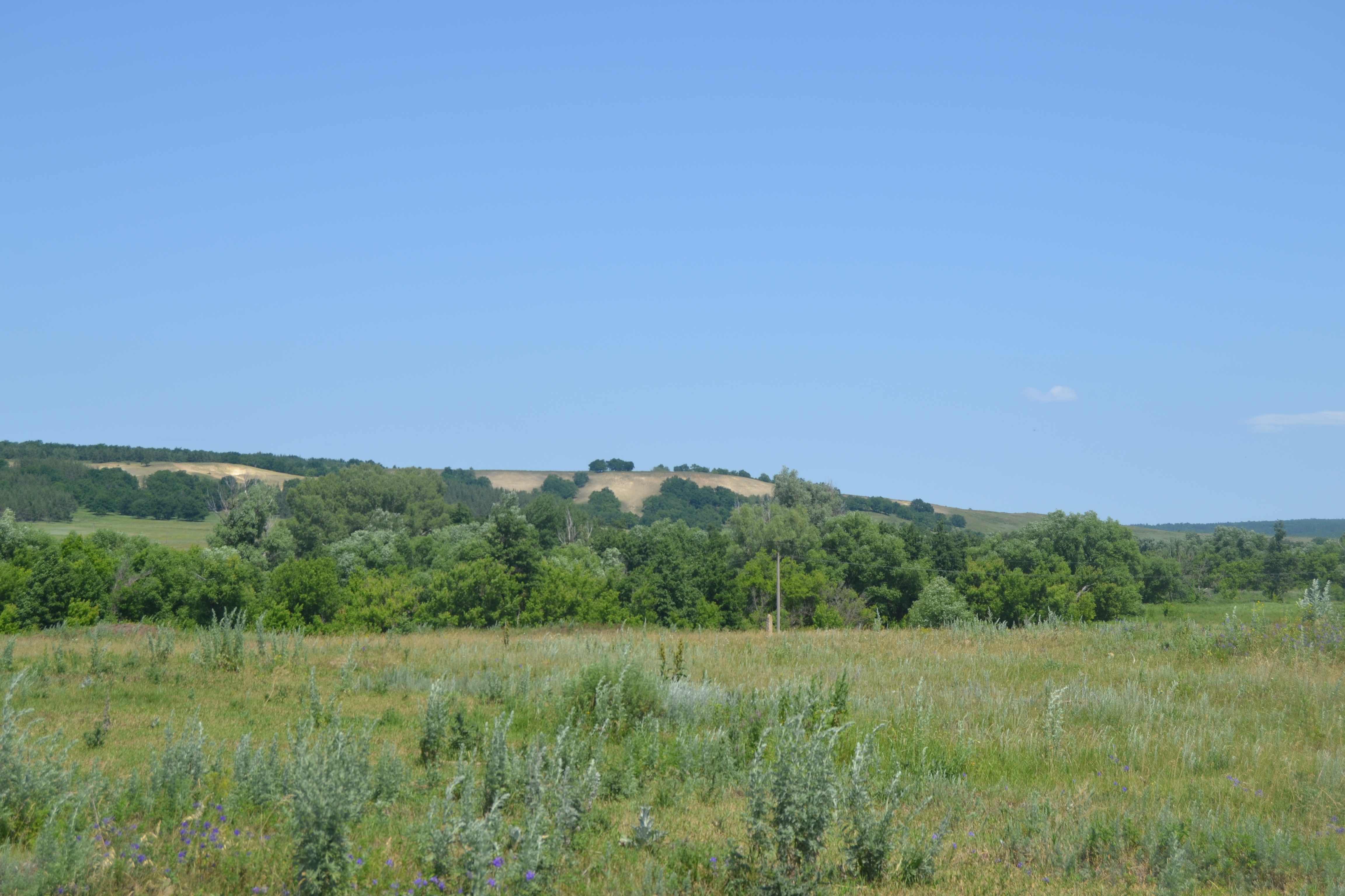 Изображение деревни. Окрестности (Махино, Саратовский район)